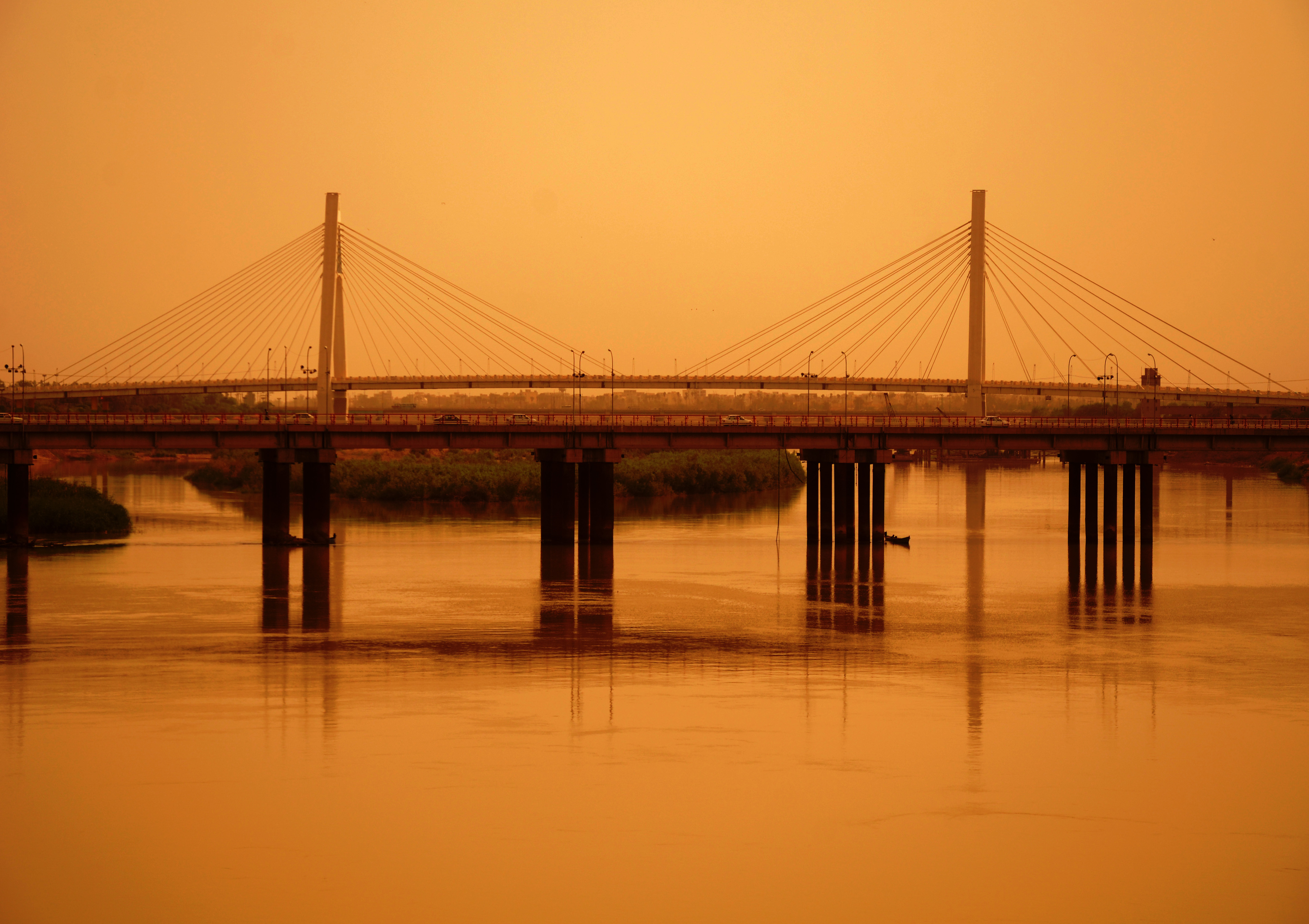 Ahvaz - Karoun - Ghadir Bridge